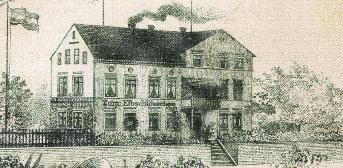 Westerhüsen, Gaststätte Zum Elbschlösschen